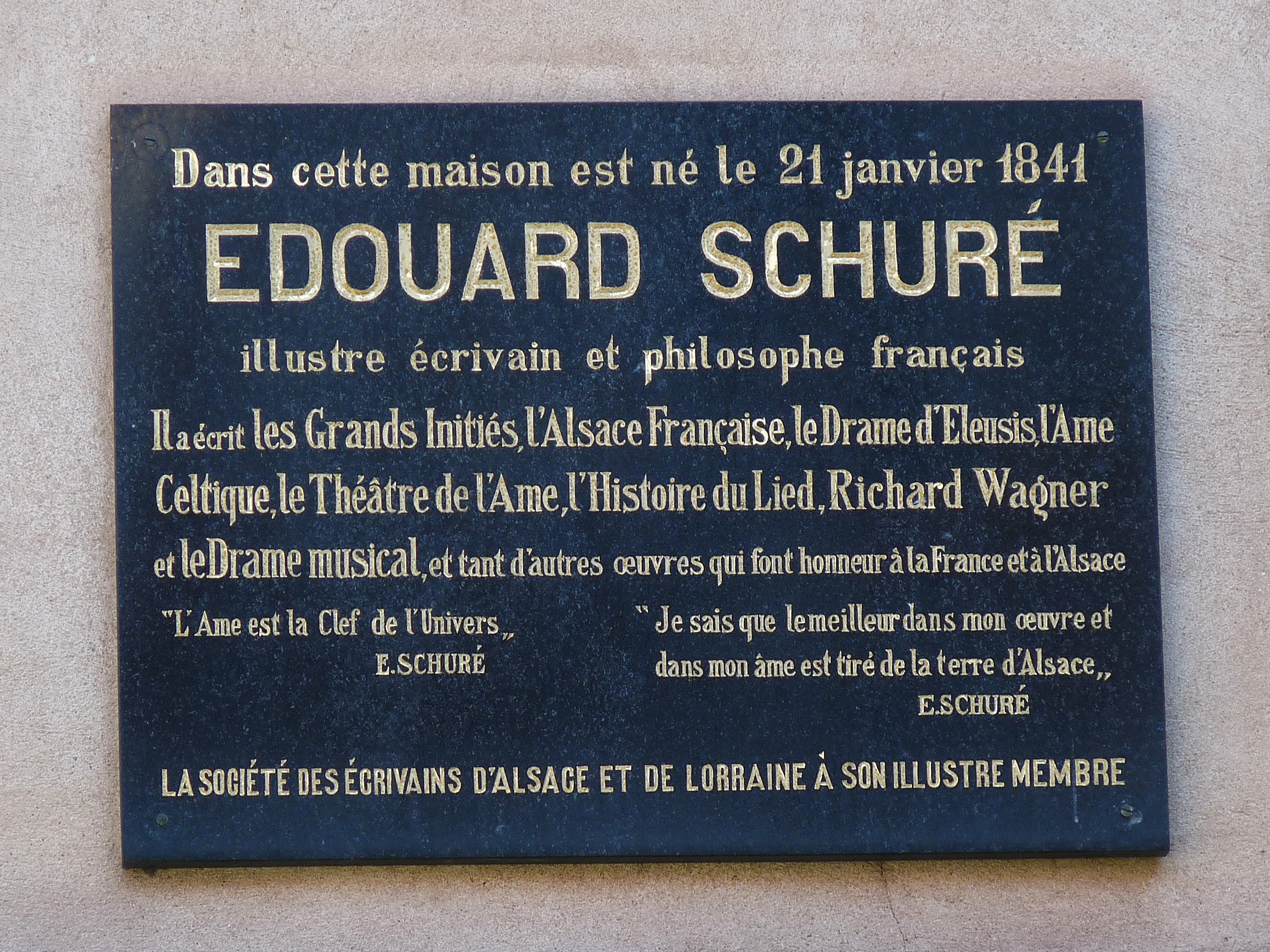 Strasbourg : plaque sur la maison natale d'Edouard Schuré au 6, cour Saint-Nicolas.